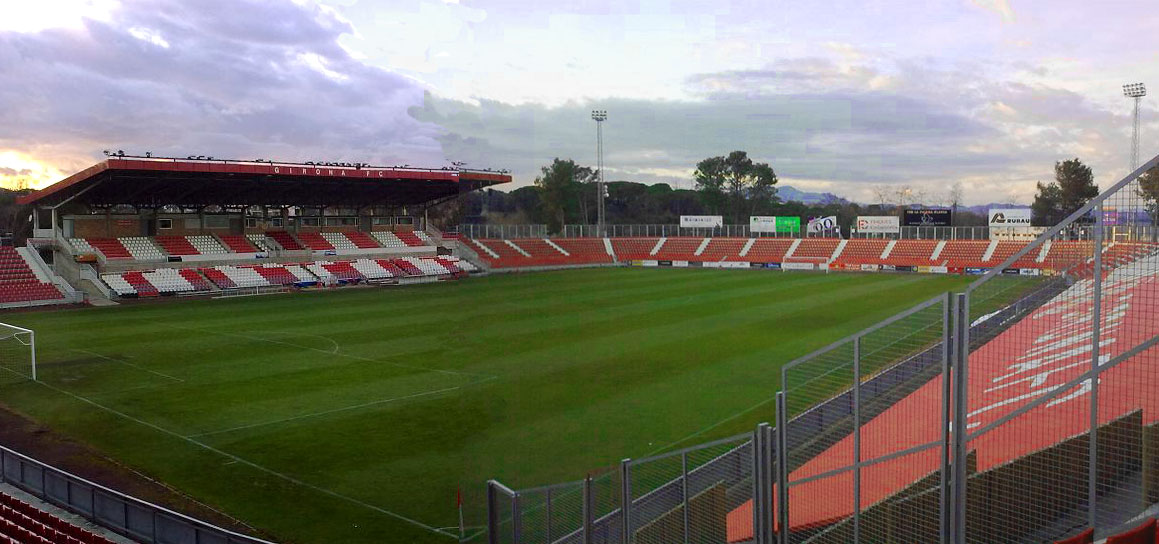 Campo Girona FC